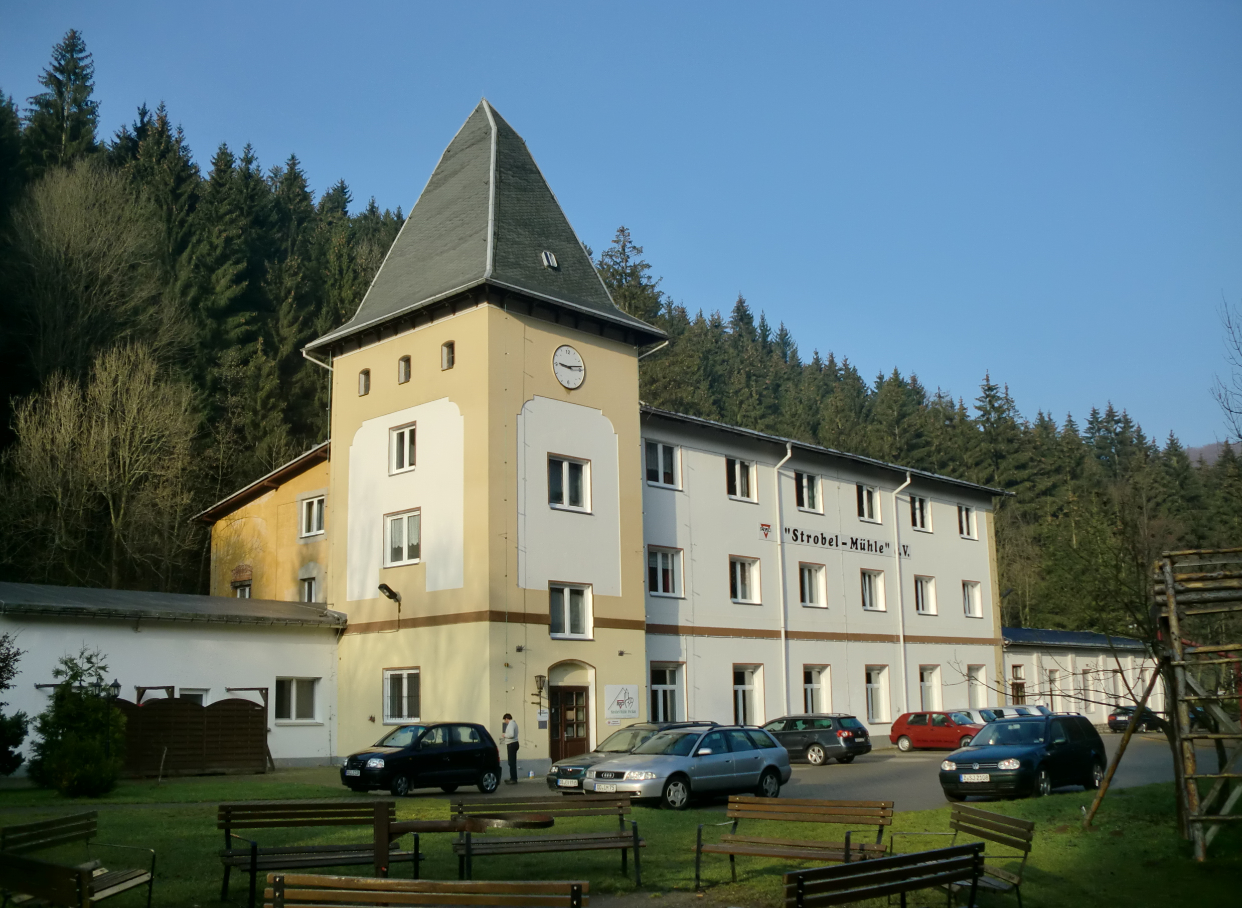 Strobelmühle Pockau von Südosten